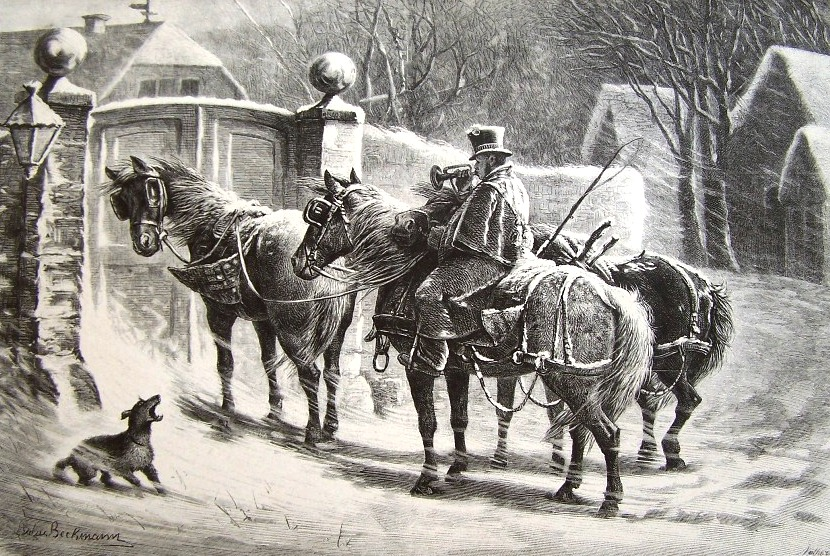 L. Beckmann.POSTILLONS CHRISTNACHT